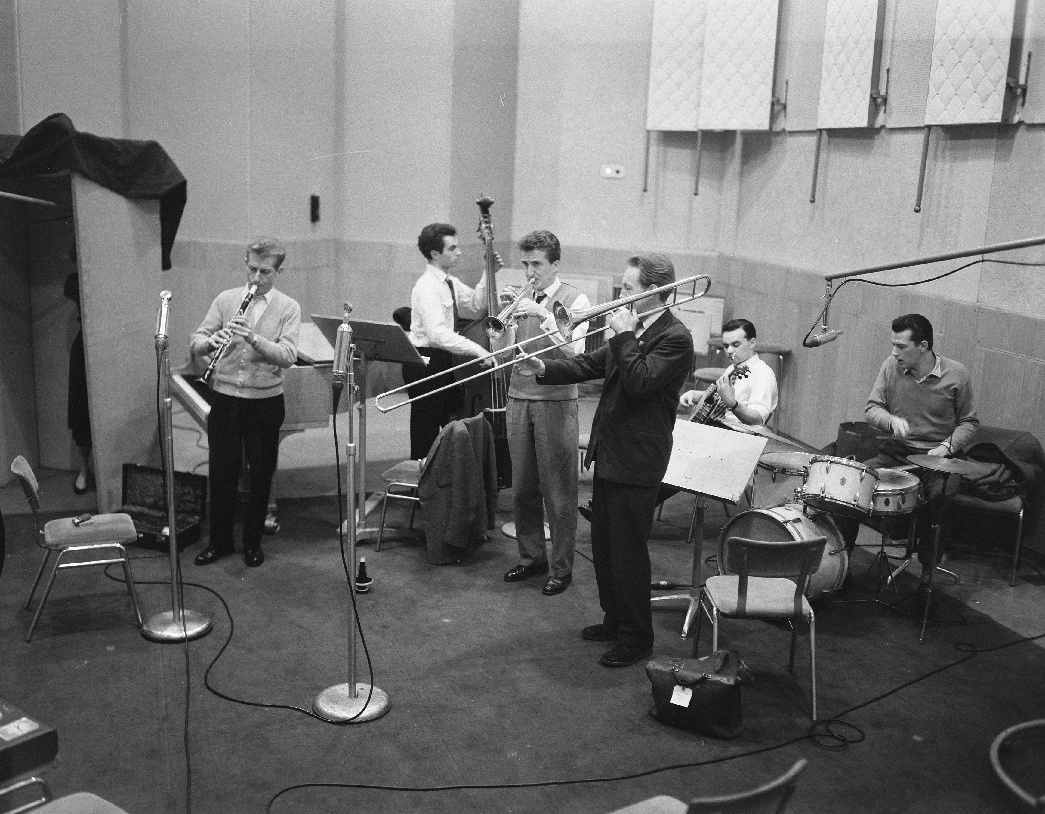 Pat Halcox (trompet); Chris Barber (trombone); Monty Sunshine (klarinet); Eddie Smith (banjo); Dick Smith (bas); Ron Bowden (drums)